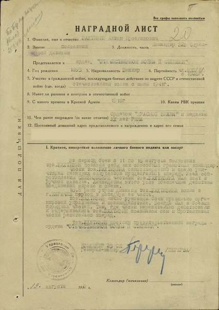 Наградной лист